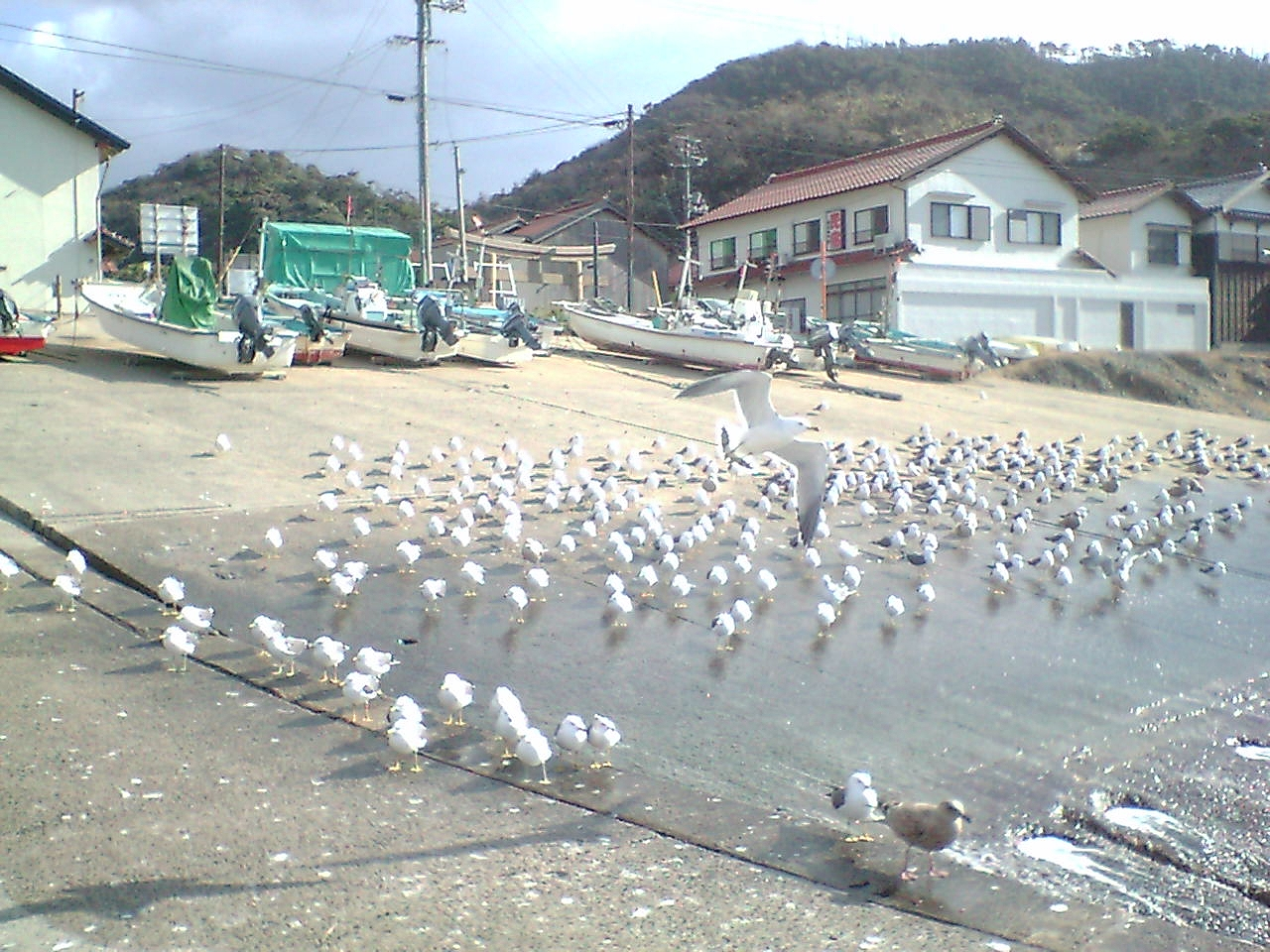 日御碕漁港のウミネコたち お昼のひなたぼっこ中?